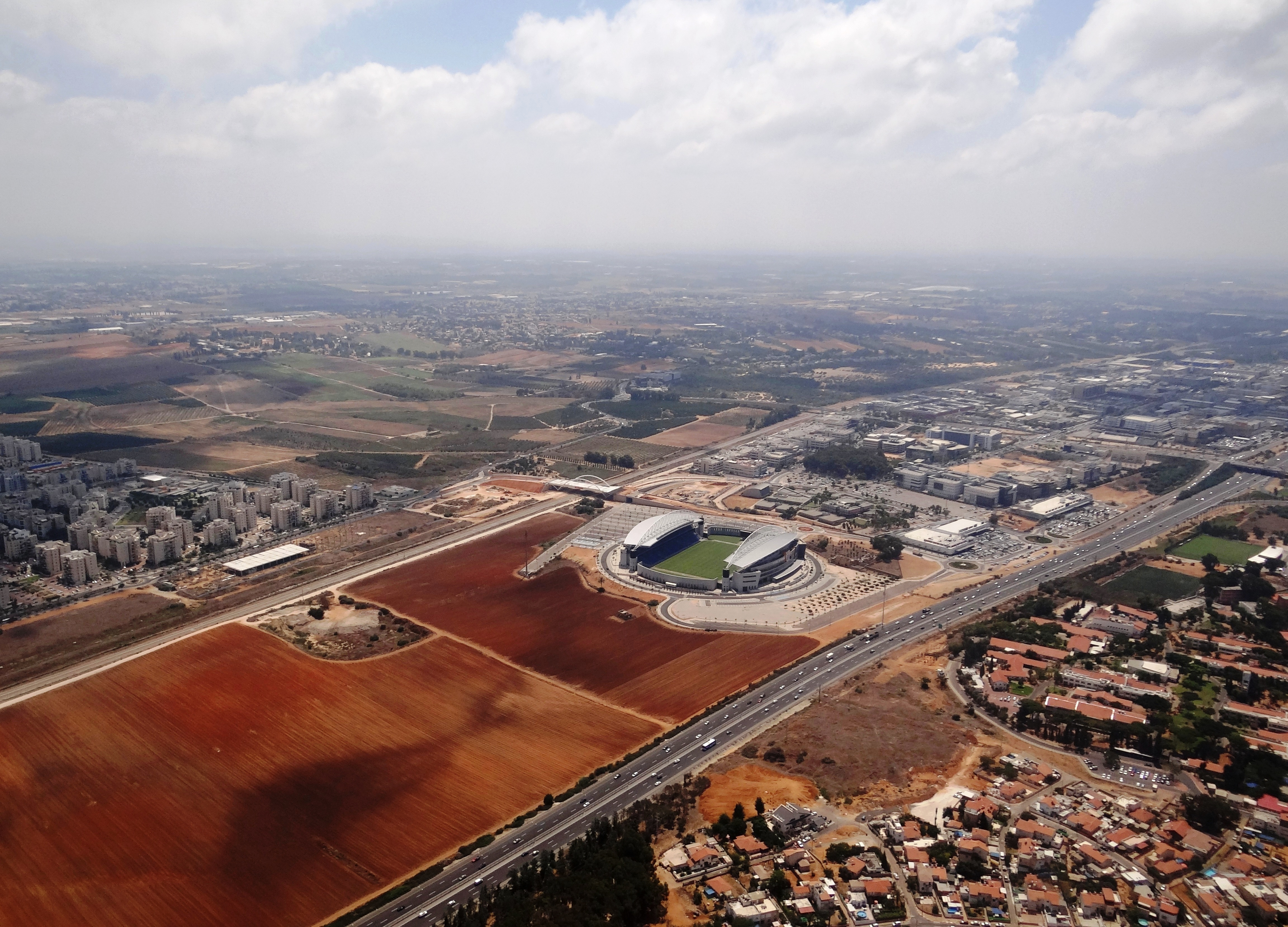 אצטדיון נתניה התצלום אווירי